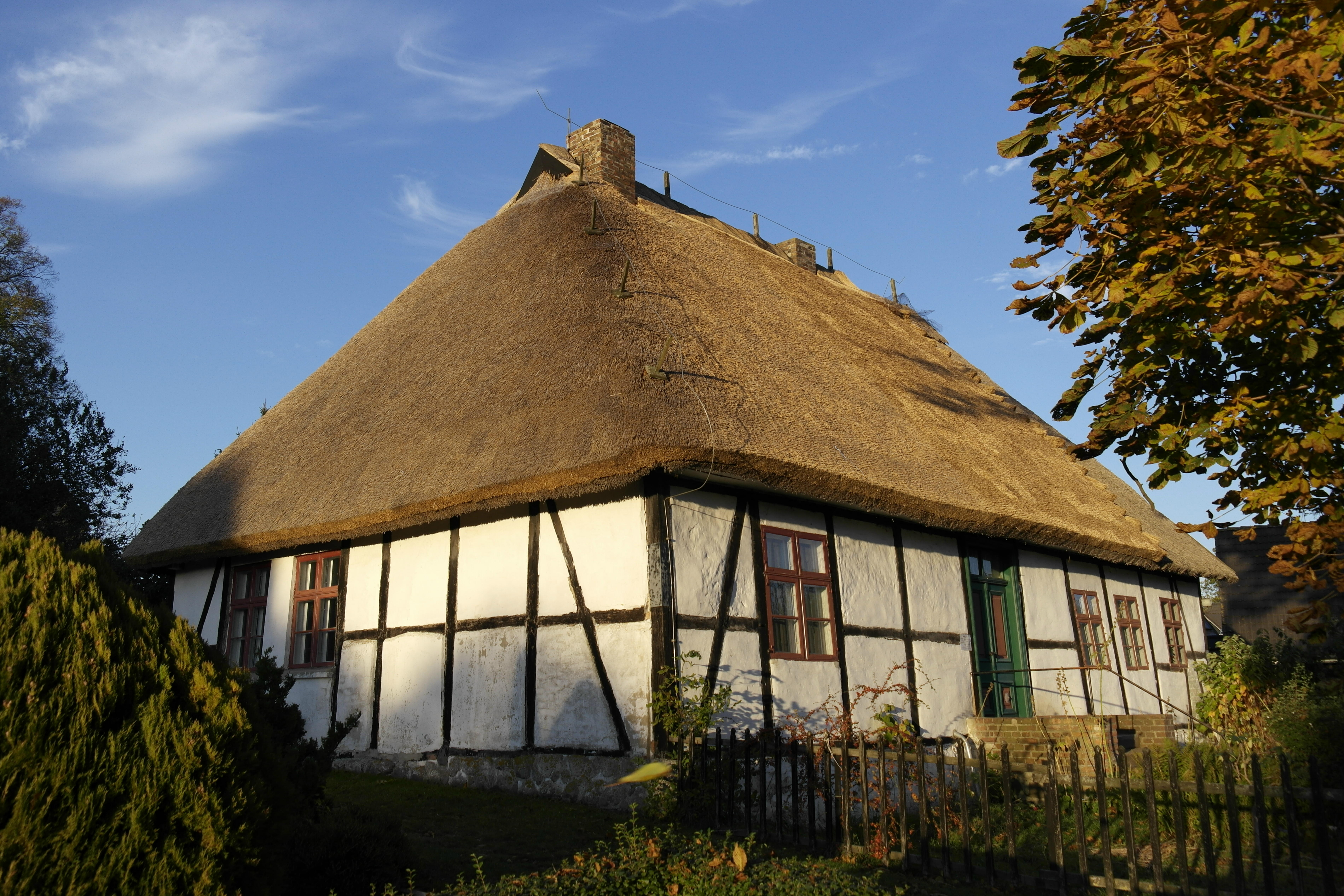 Middelhagen, alte Schule